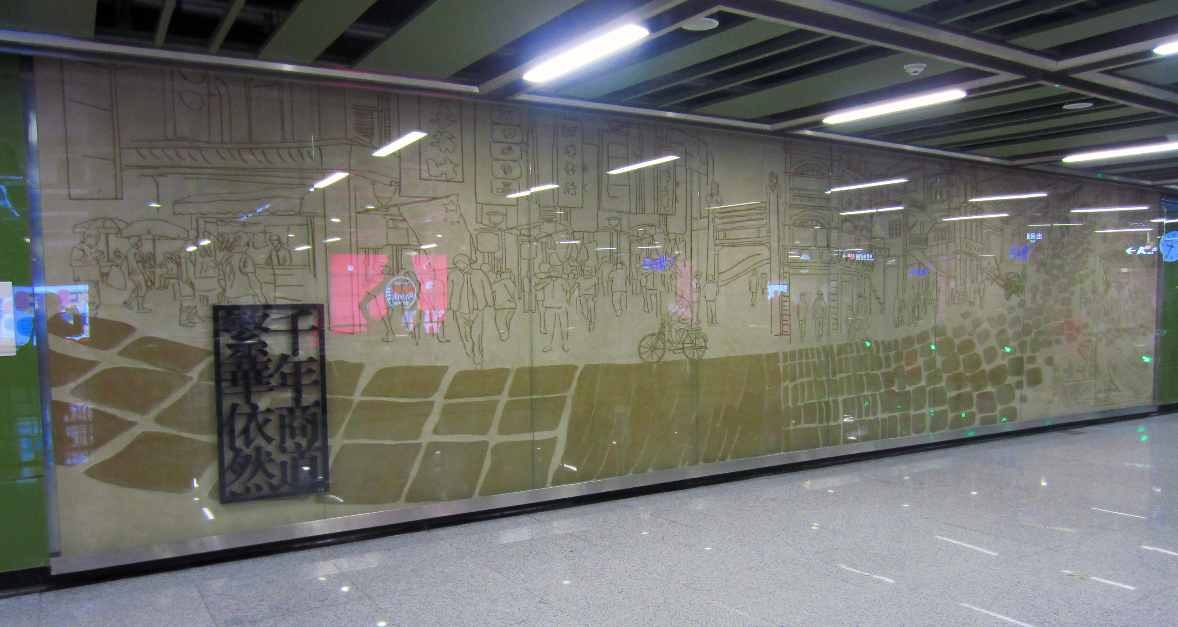 北京路站文化藝術牆